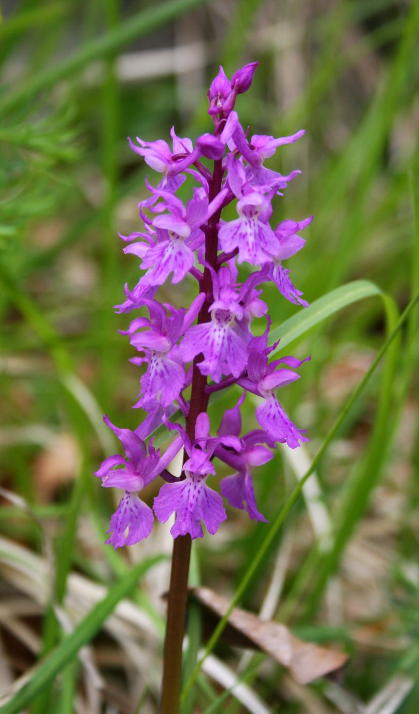 Manns-Knabenkraut (Orchis mascula subsp. speciosa), Orchideen (Orchidaceae) - Italien/Italia/Italy: Toscana, Prov. Lucca, Parco Regionale delle Alpi Apuane, SW Rifugio Donegani SW Gramolazzo